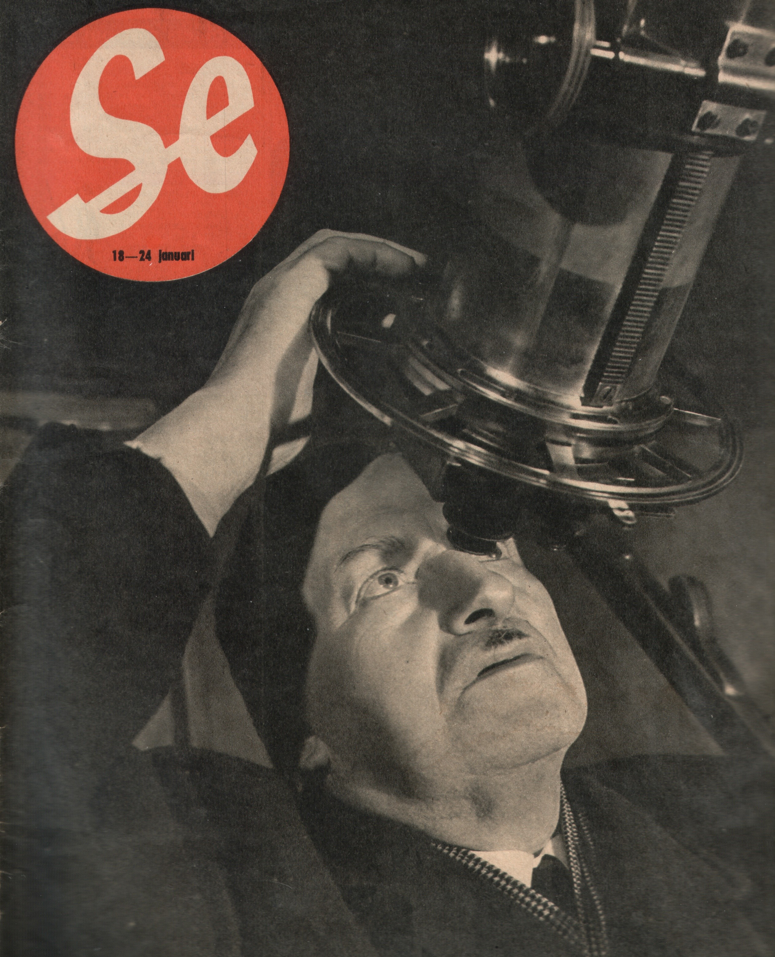 Astronomiprofessor Knut Lundmark på framsidan av bildtidningen "Se" (del av framsidan) nr 4, 1951. (Teleskop: stora refraktorn vid Lunds observatorium.)